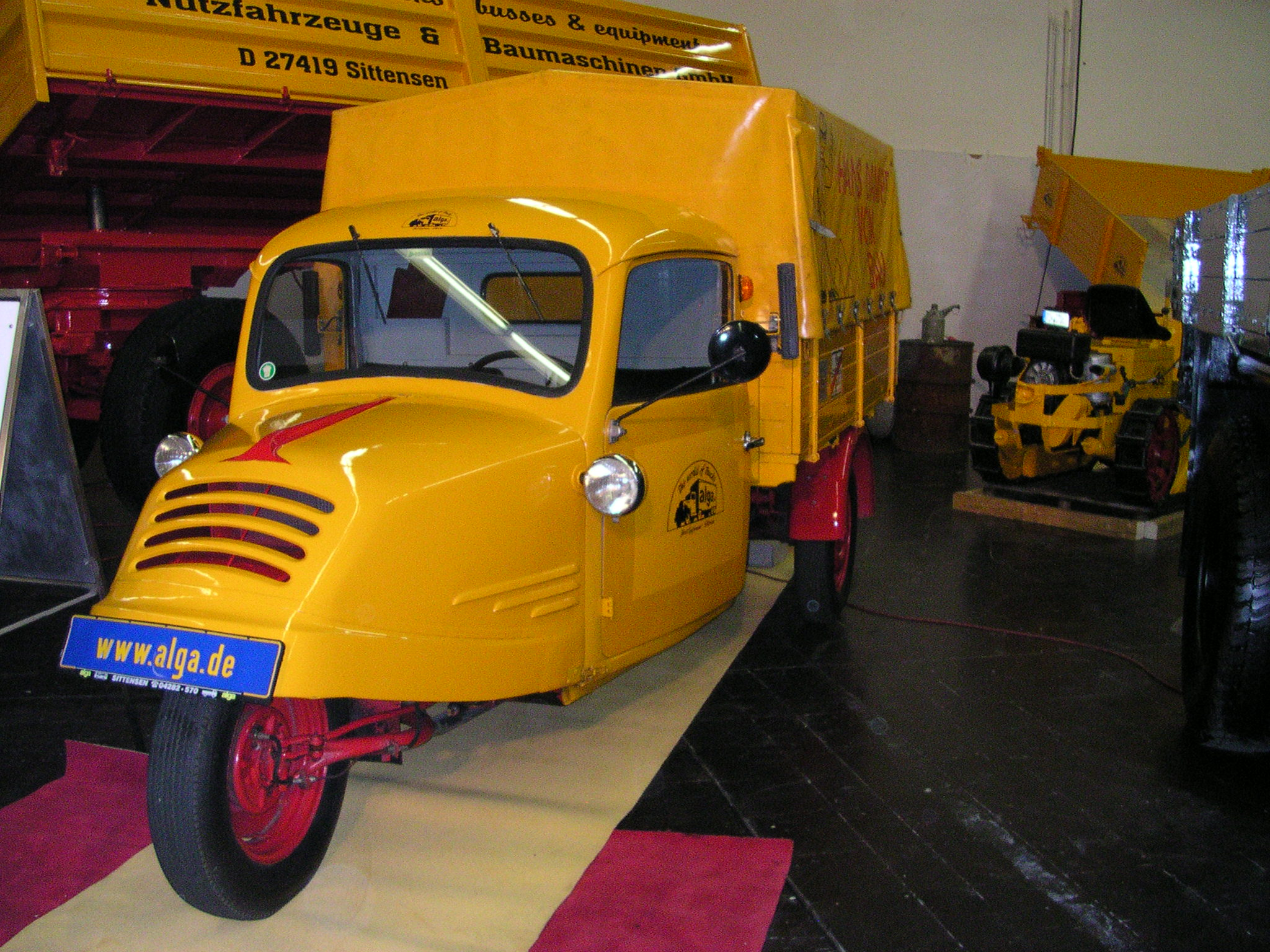 Goliath Rapid Dreirad bei der Technoclassica 2007